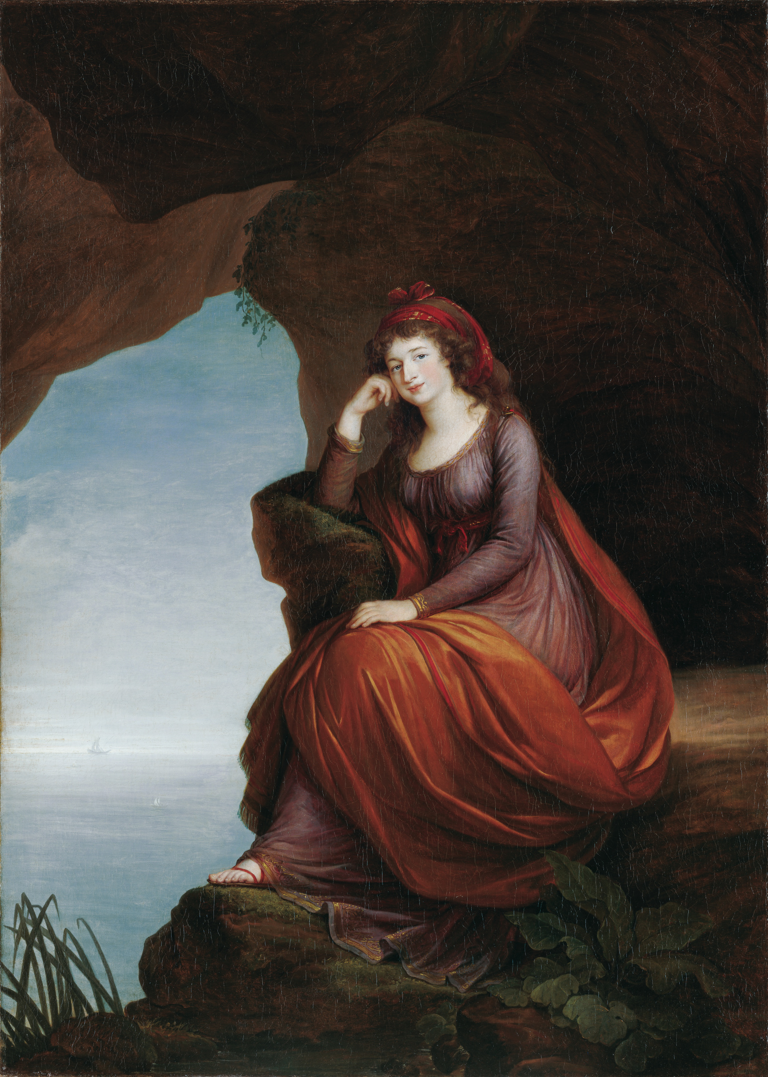 Portrait of Princess Maria Josefa Hermenegilde von Esterhazy (1793) by Elisabeth Vigée-Lebrun, Liechtenstein Museum